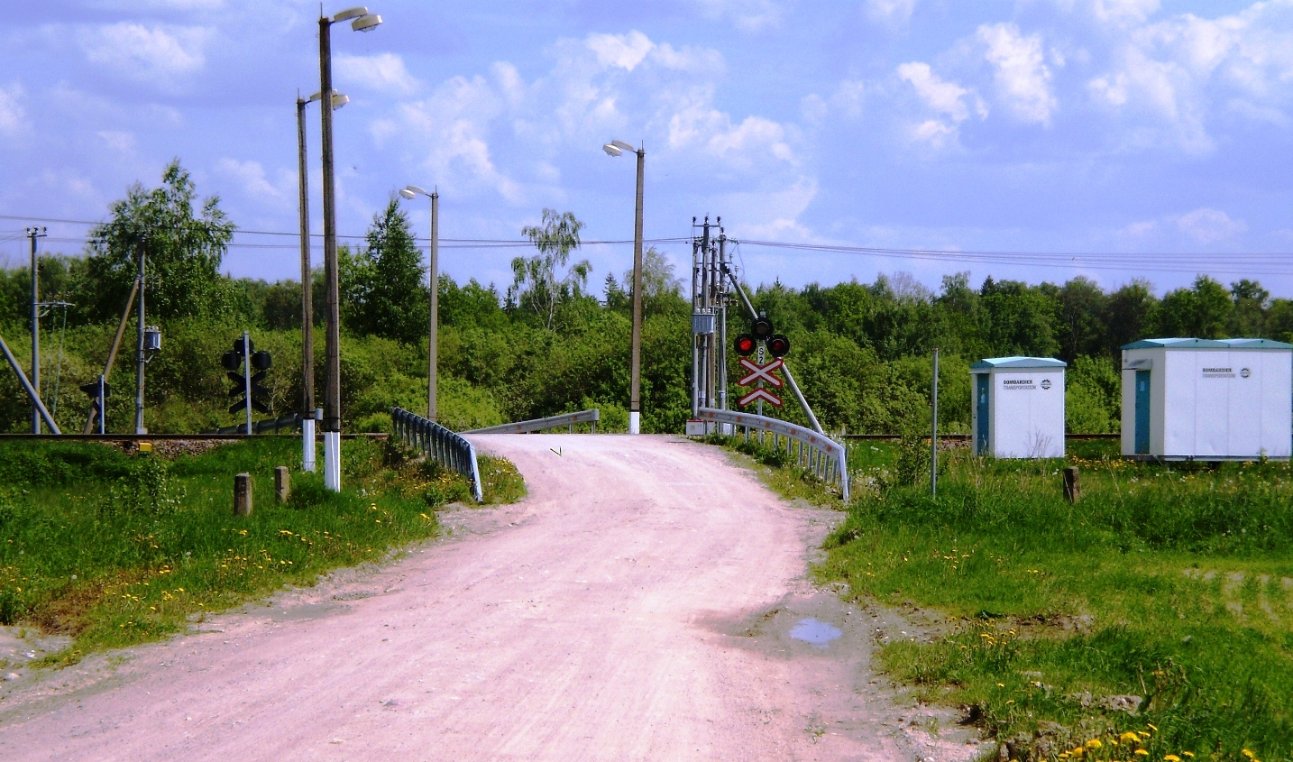 Pilėnai, geležinkelio pervaža, Kėdainių raj.